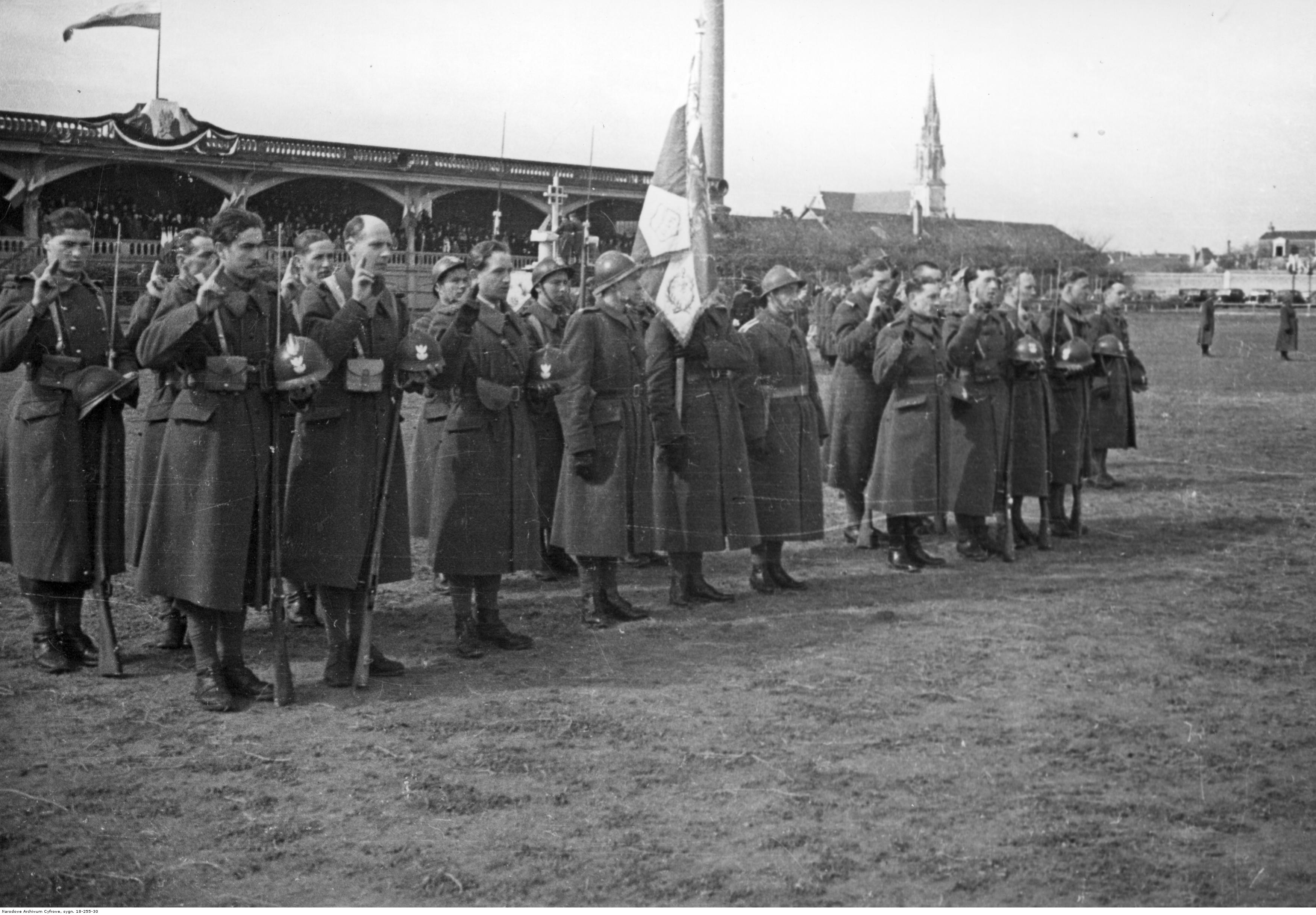 Uroczystość wręczenia sztandarów oddziałom saperów polskich we Francji - przysięga wojska. Archiwum Fotograficzne Czesława Datki. Sygnatura: 18-255-30